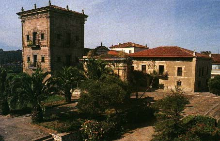 Casa Palacio del Marqués de Villapuente en Muriedas, Cantabria, actual sede del Ayuntamiento del Real Valle de Camargo